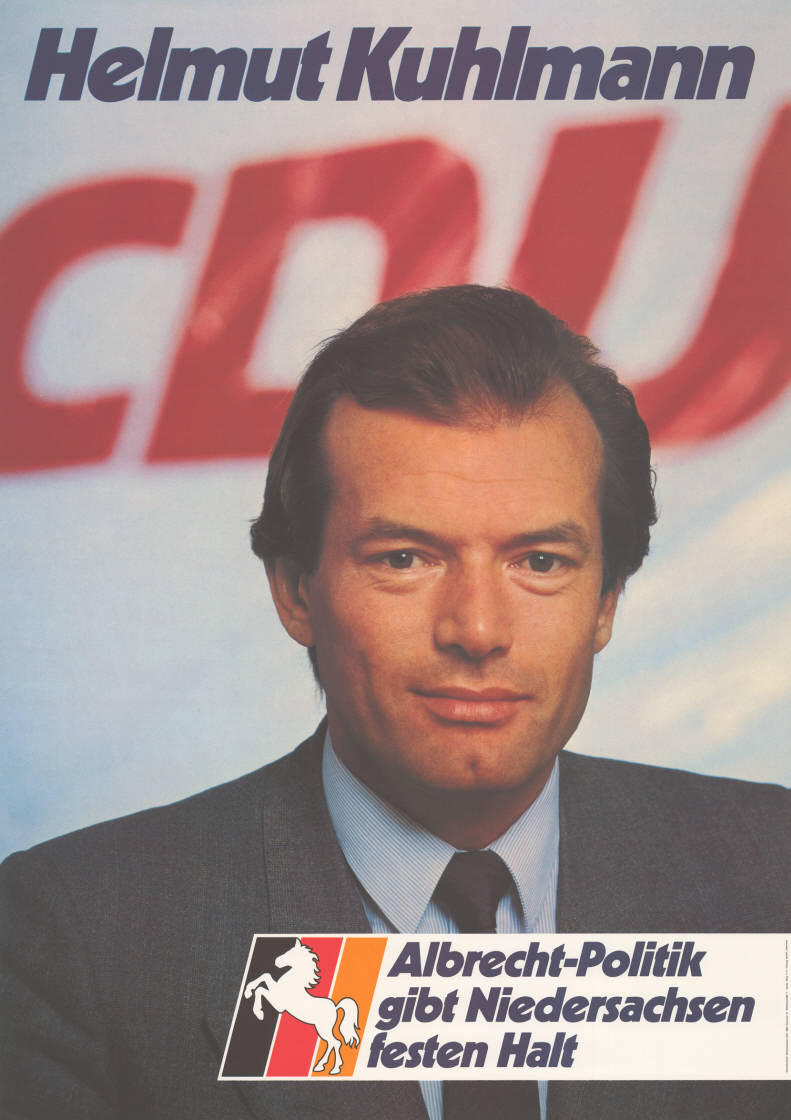 Helmut Kuhlmann CDU Albrecht-Politik gibt Niedersachsen festen Halt Abbildung: Porträtfoto - Nationalfarben mit Niedersachsenross Plakatart: Kandidaten-/Personenplakat mit Porträt Auftraggeber: Verantw.: Niedersachsen-CDU, Hannover Drucker_Druckart_Druckort: Willy F.P. Fehling GmbH, Hannover Objekt-Signatur: 10-008 : 486 Bestand: Landtagswahlplakate Niedersachsen (10-008) GliederungBestand10-18: Landtagswahlplakate Niedersachsen (10-008) » CDU Lizenz: KAS/ACDP 10-008 : 486 CC-BY-SA 3.0 DE